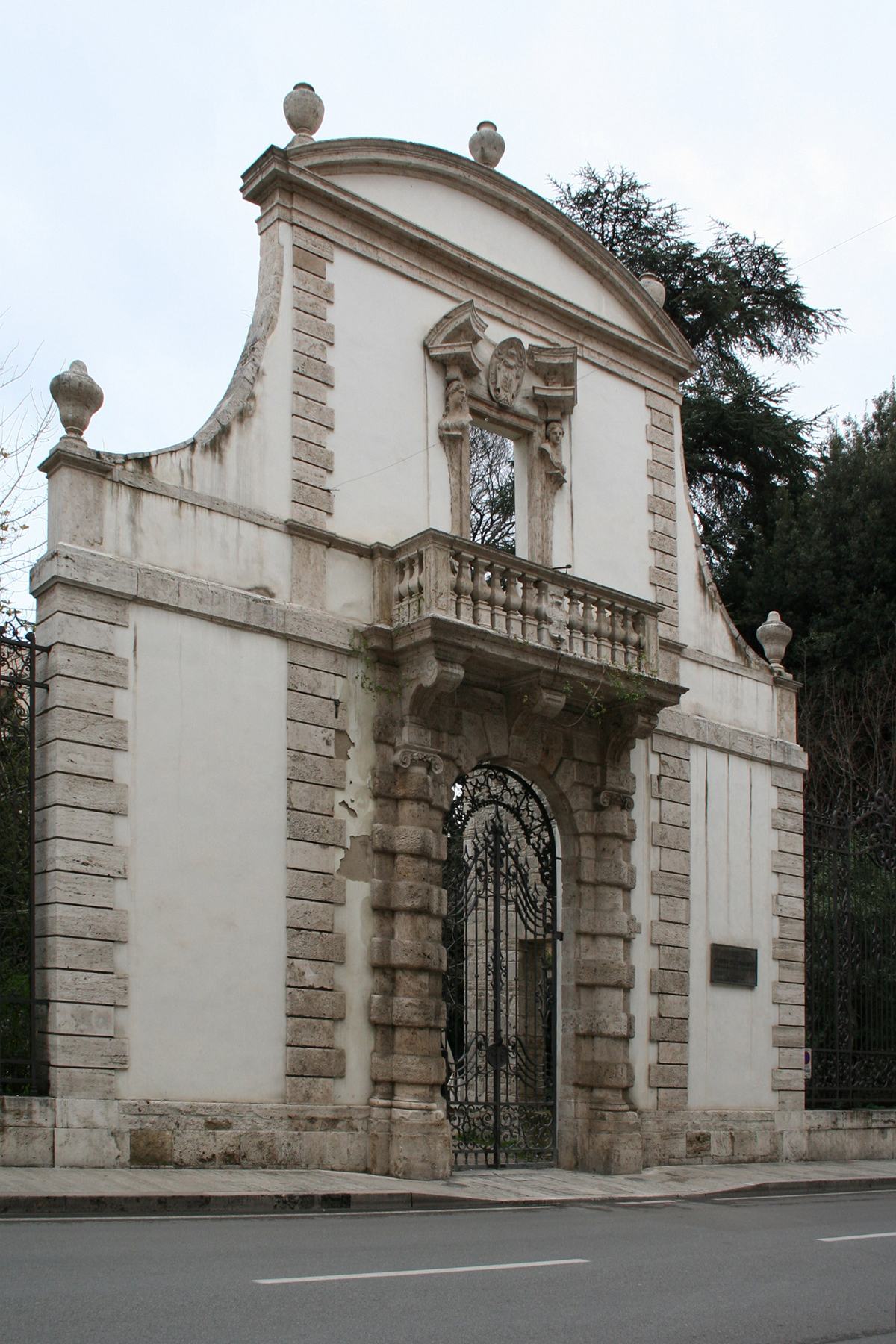 Portale barocco realizzato da Giuseppe Giosafatti, nel XVII secolo, per il palazzo del canonico Candido Malaspina. Attualmente al civico n. 26 di Corso Vittorio di Ascoli Piceno, dove ha sede la Camera di Commercio.